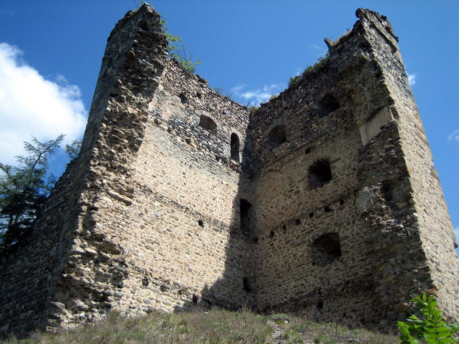 Mauern von Alt-Süns